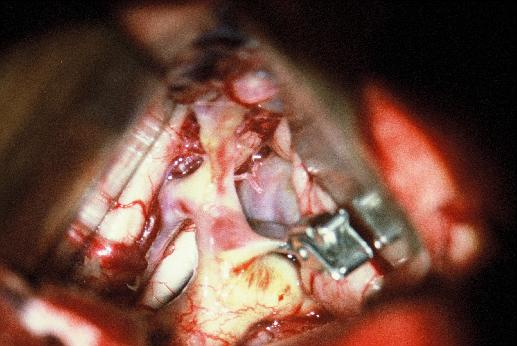 Hirngefäßaneurysma, Zustand nach clipping, offener OP-Befund Bild wurde freundlicherweise von Herrn Prof. G. Penkert, Hannover zur Verfügung gestellt und für die GNU-FDL freigegeben.